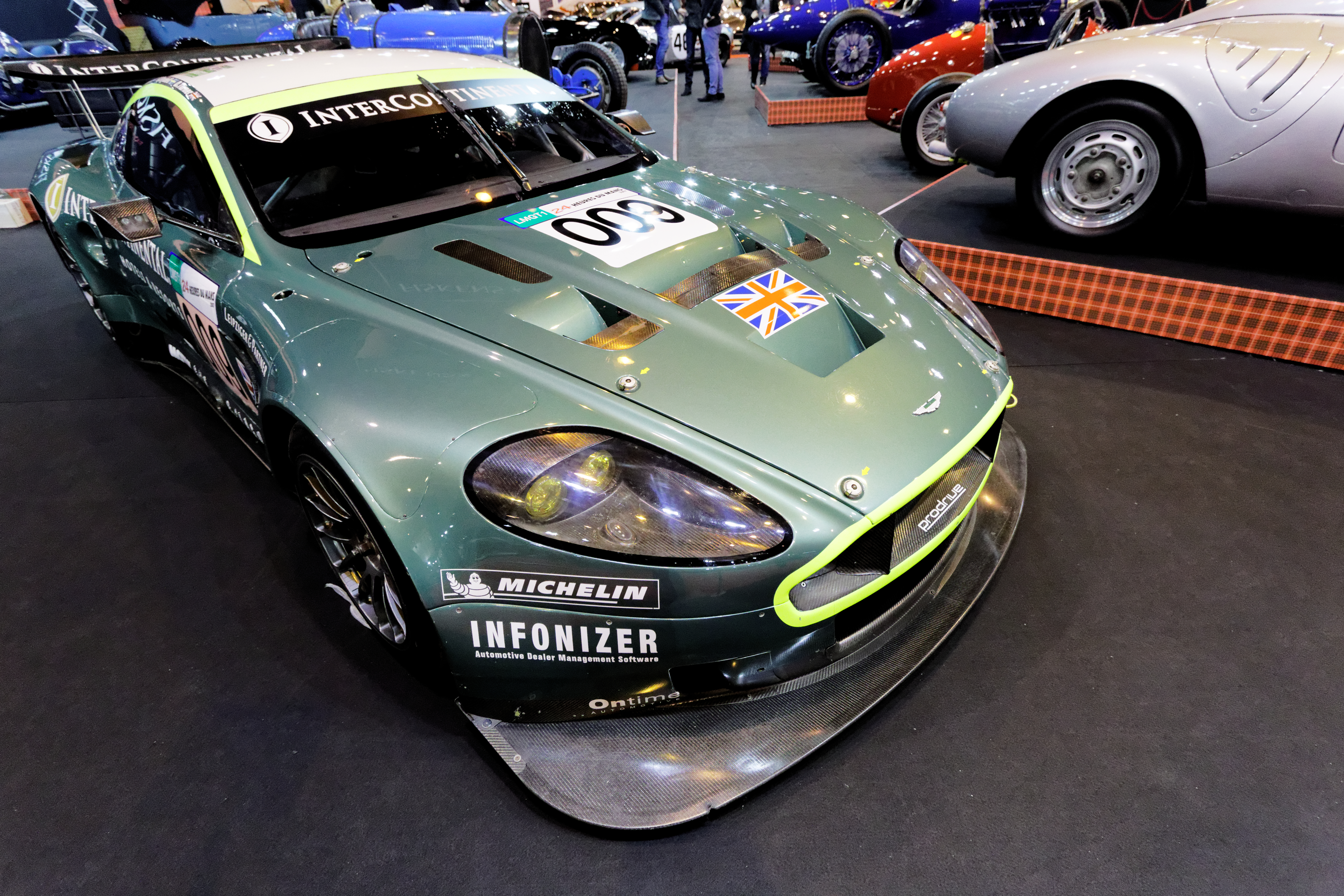 Une des voiture présentée lors du salon Rétromobile de Paris 2015